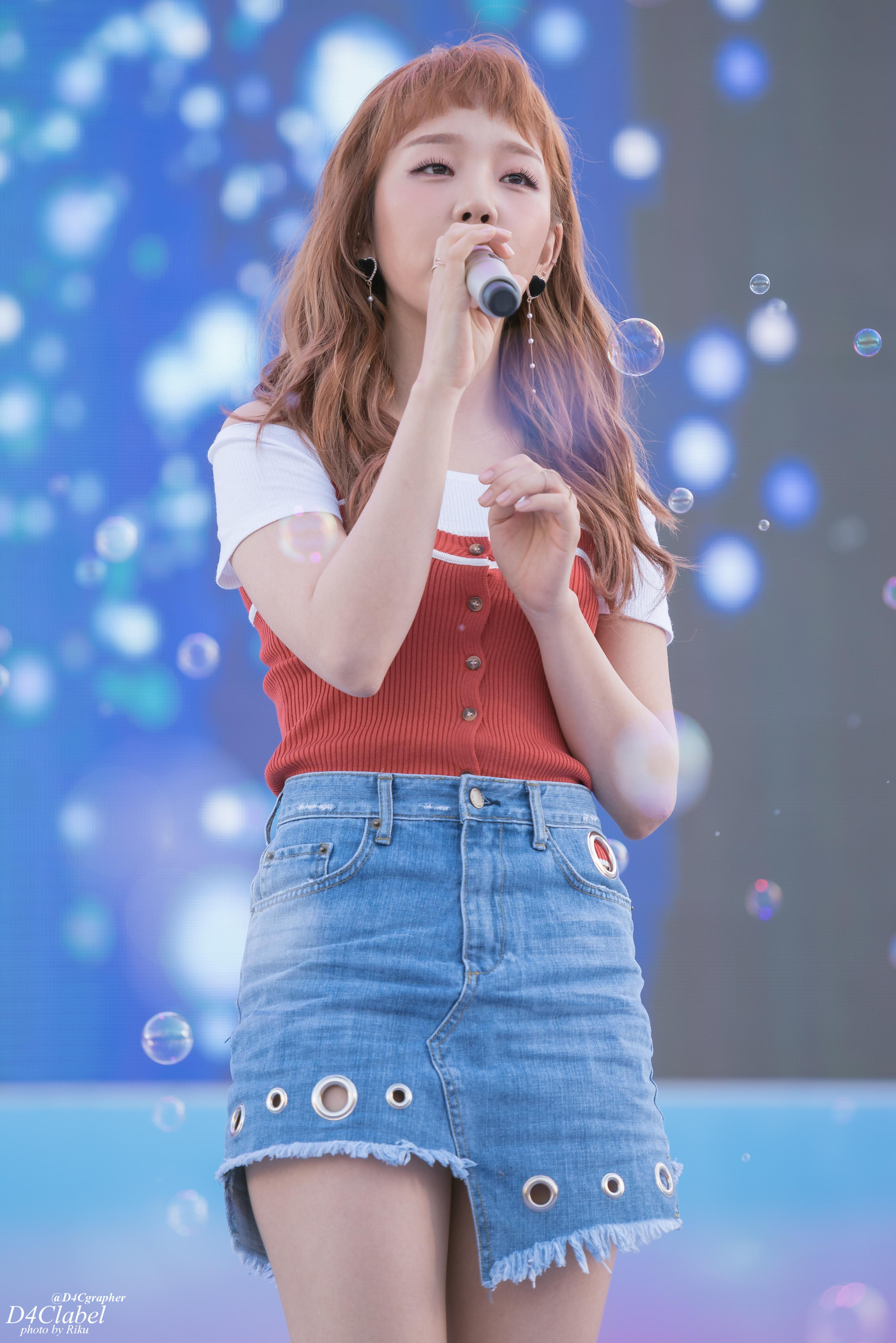 [17.05.25] 백아연